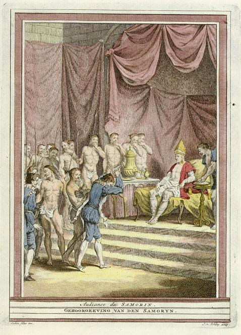 സാമൂതിരിയുടെ രാജസദസ്സ്. വാസ്കോഡഗാമയെ പരിചയപ്പെടുത്തുന്നത് (1497-98). ശില്പി-പ്രിവോസ്റ്റ്, നിറങ്ങൾ പിന്നീട് ആലേഖനം ചെയ്യപ്പെട്ടതാണ്(1760)